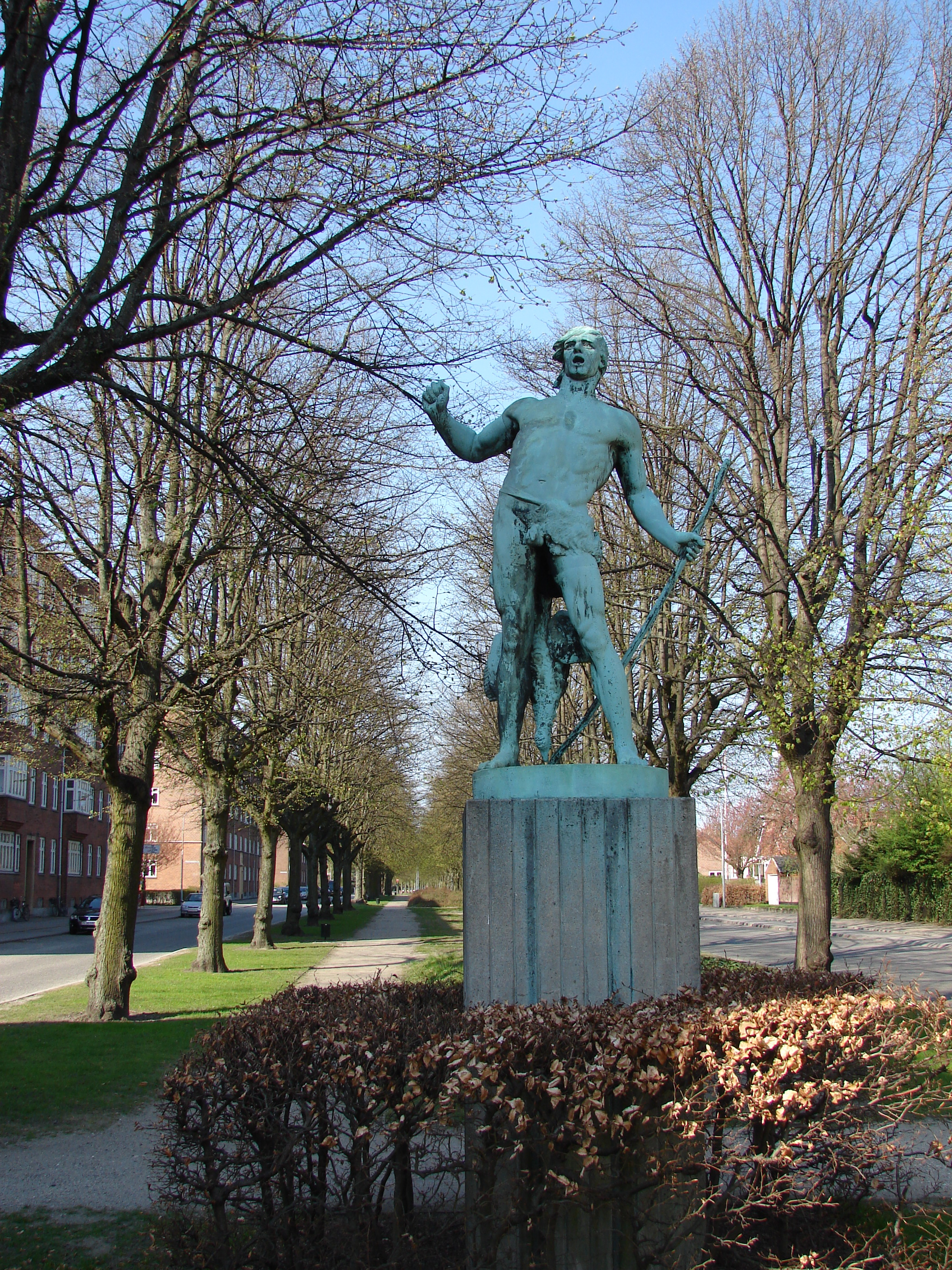 Urjægeren (Jægeren, En Jæger fra Stenalderen) (1922) af Aksel Hansen (1853-1933), Dalgas Boulevard, Frederiksberg, opstillet 1926